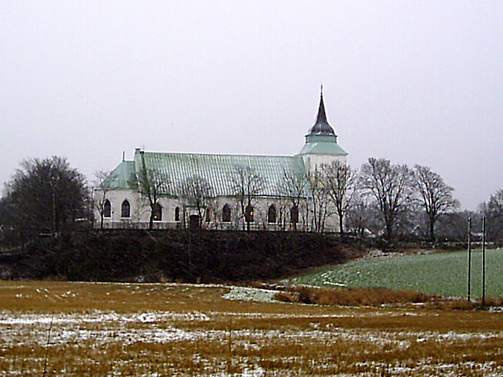 Tegneby kyrka i Tegneby församling, Orusts kommun. Photo by Tubaist